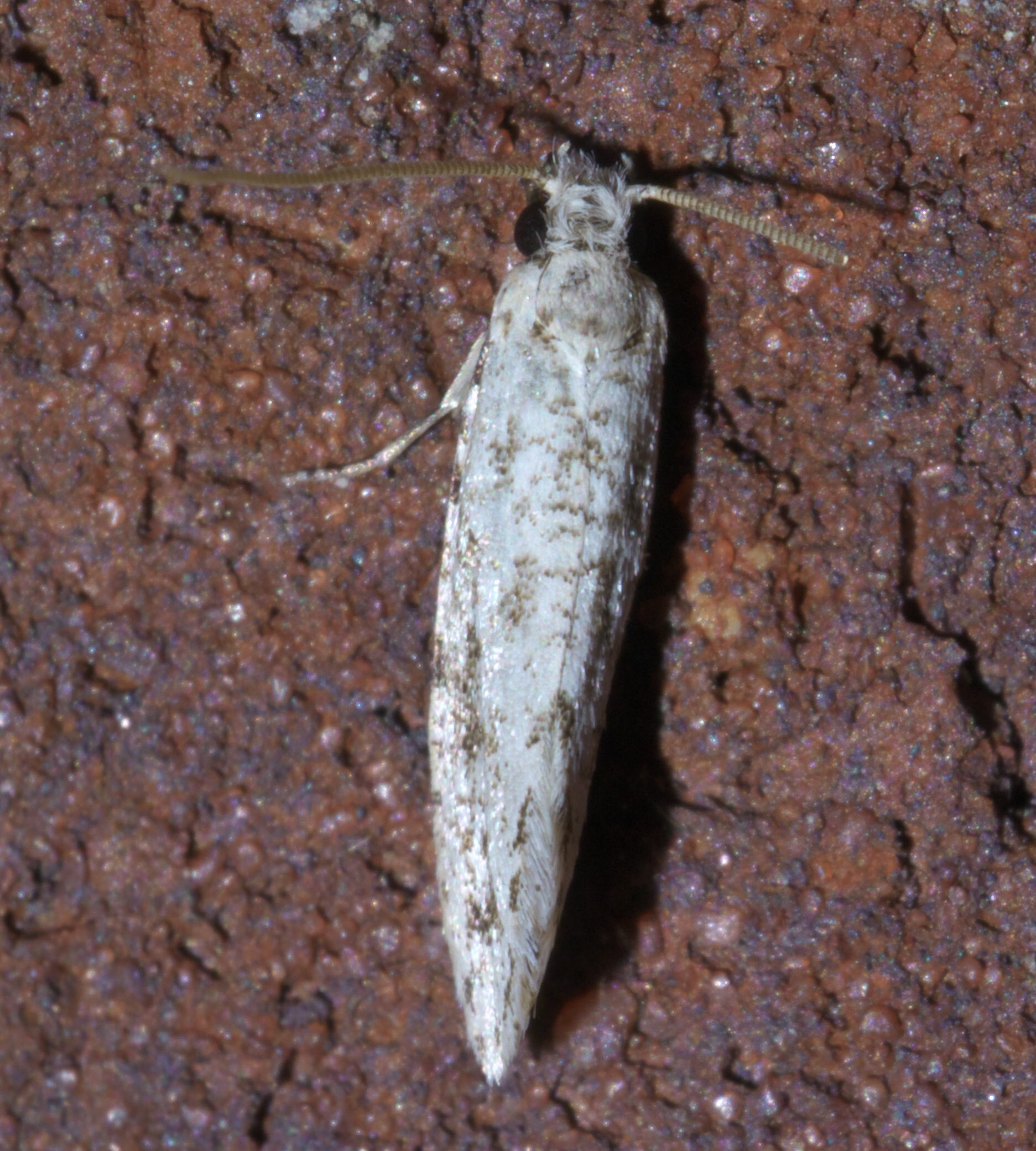 Nemapogon acapnopennella, Hodges #0261, ID Confidence: 87